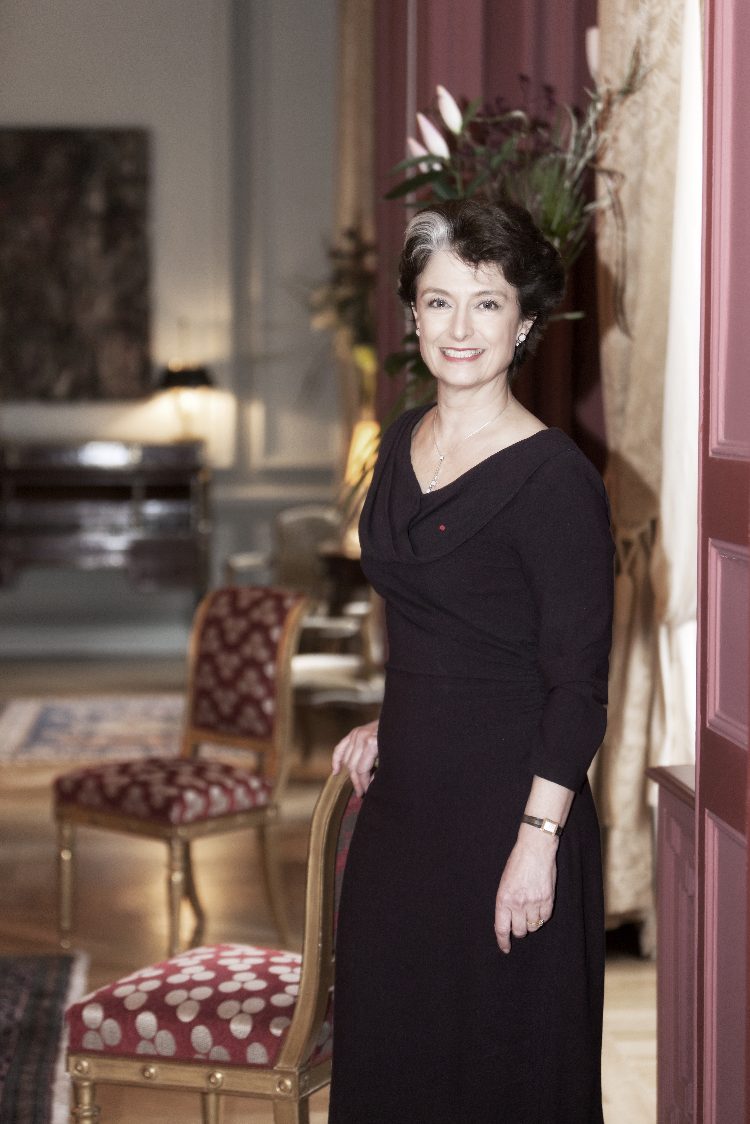 Claude-France Arnould, Ambassadrice de France en Belgique, à la Résidence de France.